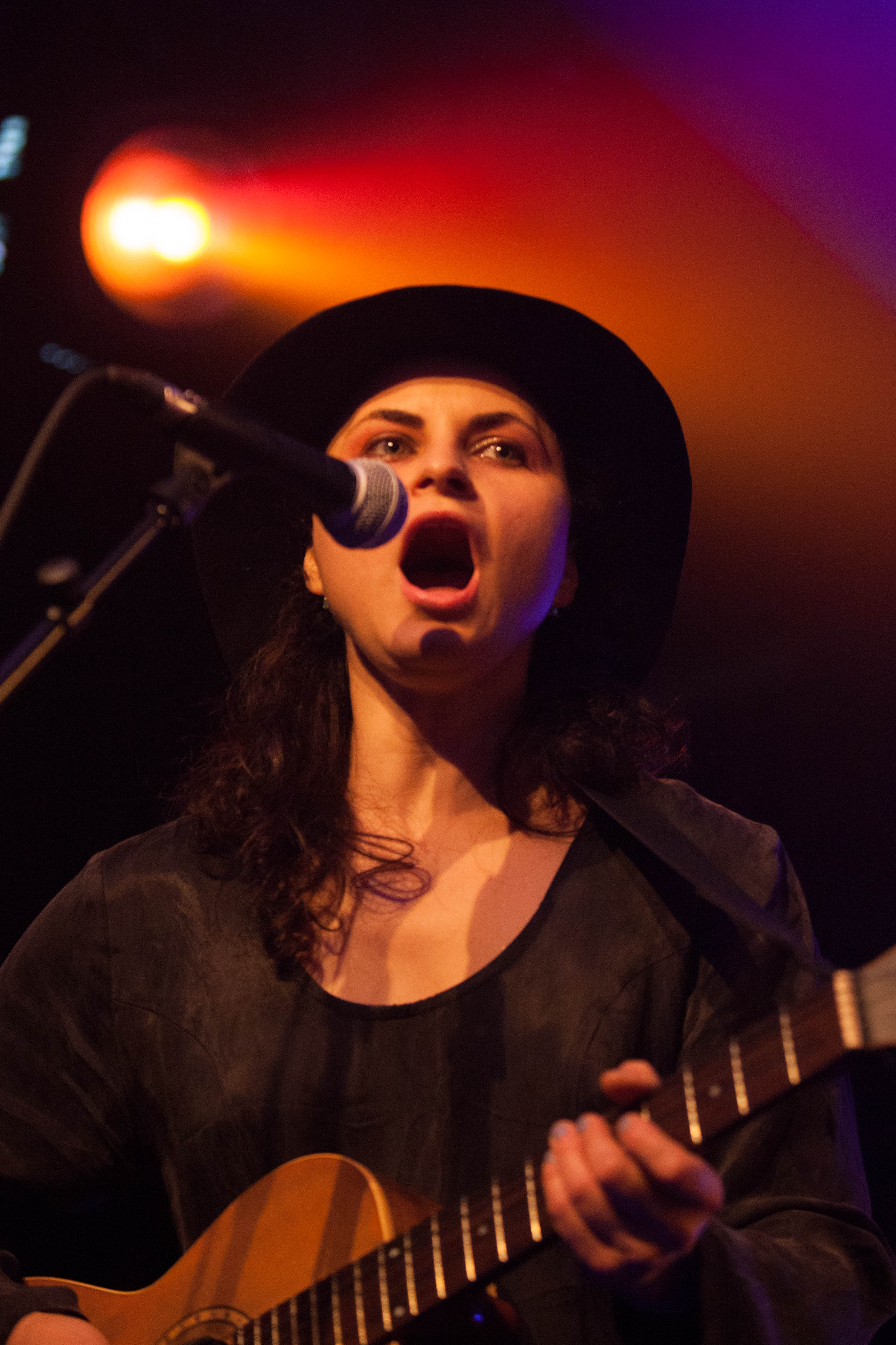 Soko, In Montreux Jazz Café